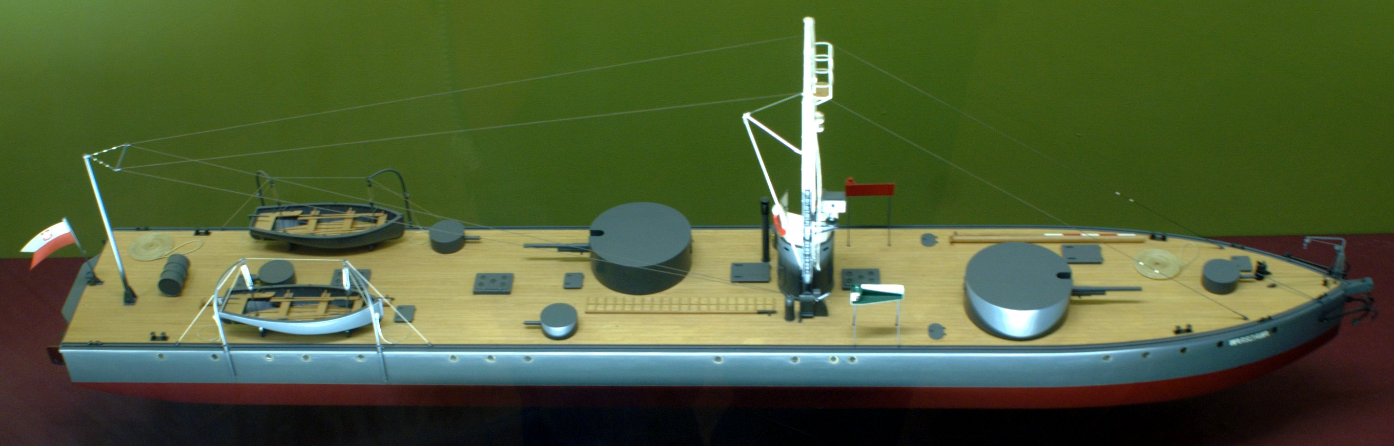 Model monitora rzecznego ORP Warszawa (1920) w skali 1:50, wykonany przez P. Komender